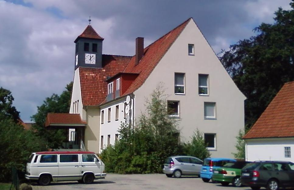 Die "Alte Schule" in Rehren